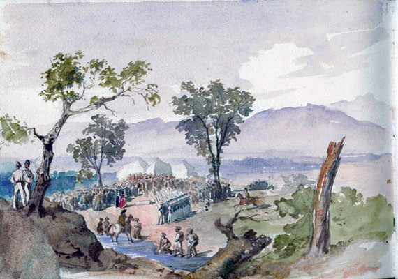 При Валерике. Похороны убитых. Данное изображение в чёрно-белом варианте было использовано в статье «Валерик» опубликованной в пятом томе «Военной энциклопедии», который был издан книгоиздательским товариществом Ивана Дмитриевича Сытина в 1911 году в столице Российской империи городе Санкт-Петербурге.